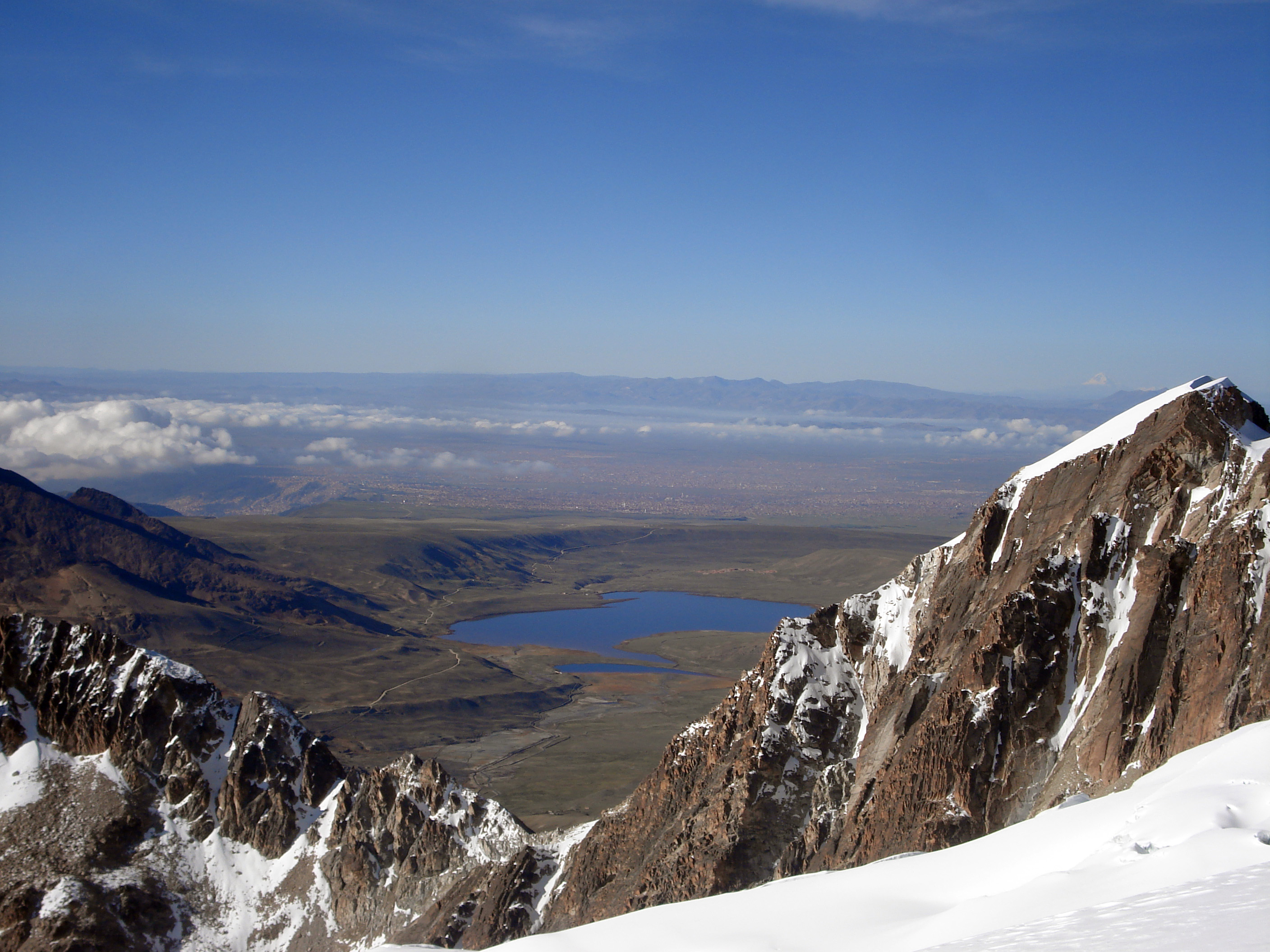 Paisaje andino boliviano